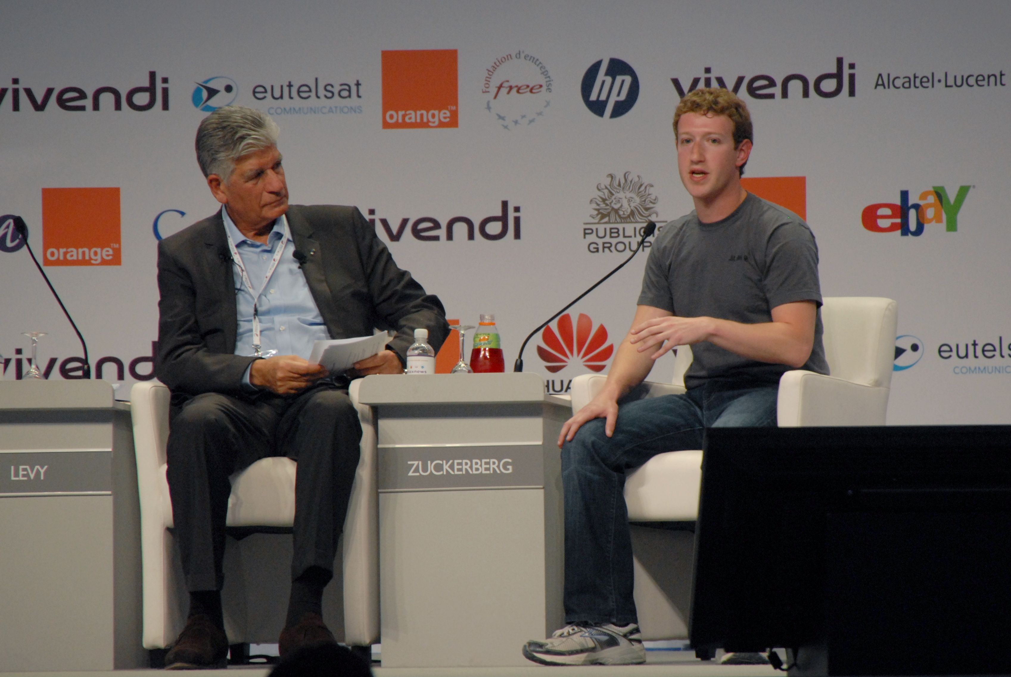 Dialogue entre Maurice Lévy et Mark Zuckerberg pour la clôture de l'e-G8